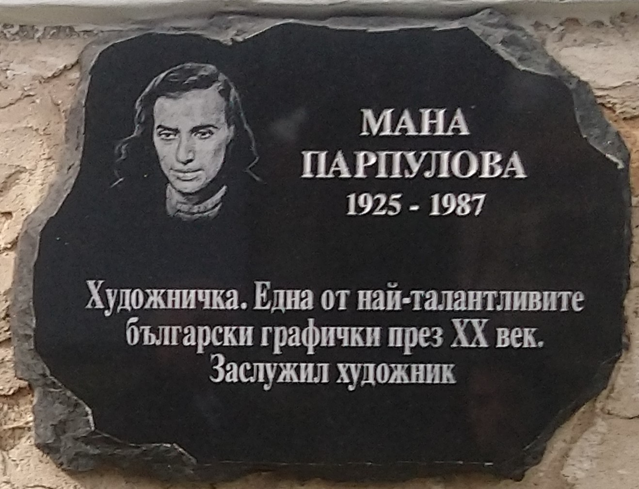 Мана Парпулов (1925-1987) - плоча в Исторически музей Панагюрище - Надпис: Художничка. Една от най-талантливите български графички през ХХ век. Заслужил художник.